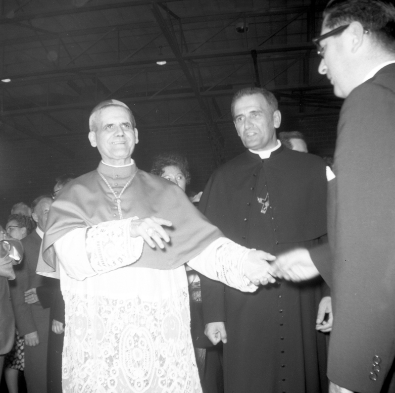 Le cardinal Paul-Émile Léger, archevêque de Montréal, et le r. p. Maurice Lafond, c.s.c., supérieur du Collège Sainte-Croix, lors de l'inauguration et bénédiction des nouvelles ailes du Collège Sainte-Croix, à Montréal, le 19 mai 1962.